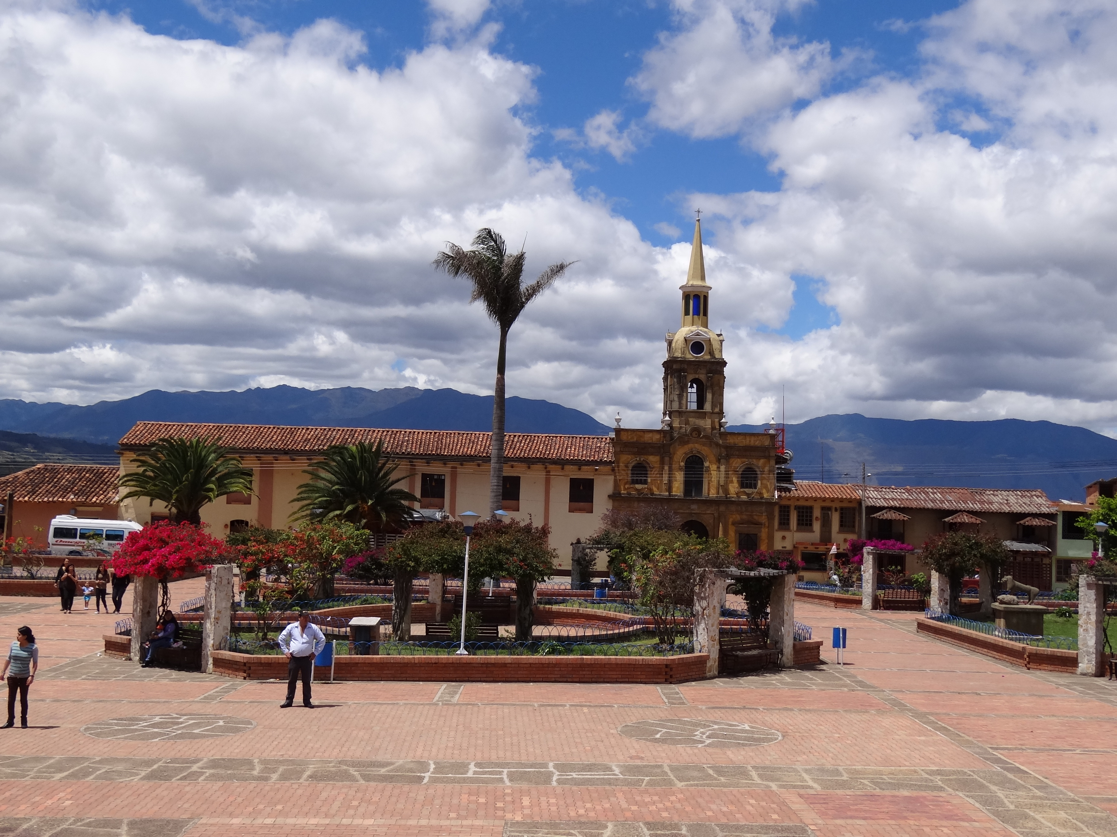 Parque del municipio de Santa Sofía, departamento de Boyacá, Colombia.